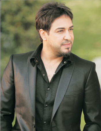 صورة للفنان العراقي . رضا العبد الله